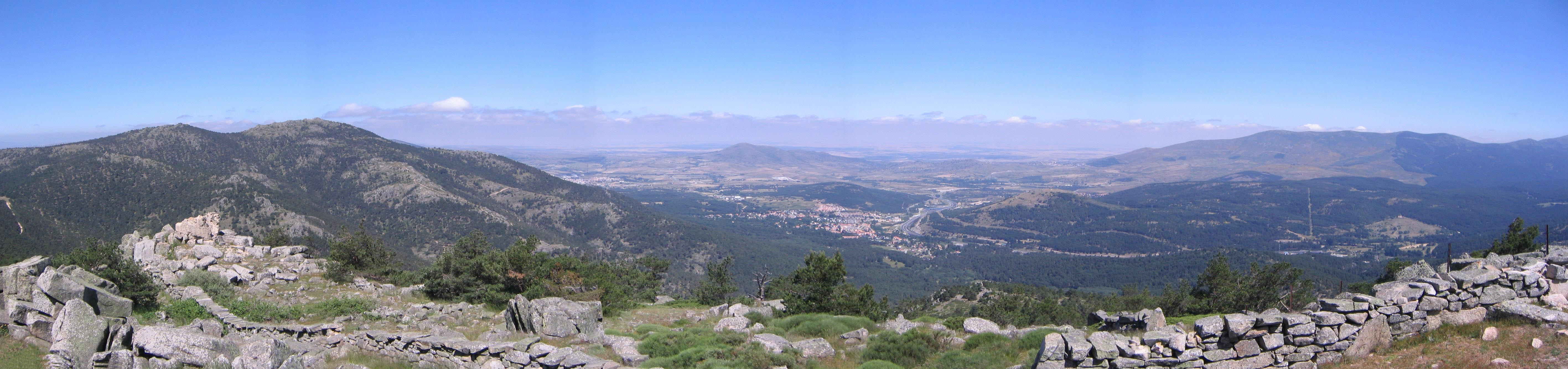 El Espinar visto desde el monte Cabeza Líjar en la sierra de Guadarrama, España. Se aprecia a la izquierda el monte Cueva Valiente, bajo él el núcleo de San Rafael, al fondo a la derecha La urbanización Los Ángeles de San Rafael, al fondo a la izquierda el núnleo de El Espinar y a la derecha, detras de Cabeza Reina, el núcleo del barrio de La Estación.